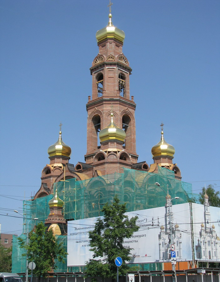 Восстанавливаемый храм «Большой Златоуст» в Екатеринбурге (был взорван в 1930 году, восстанавливается с 2006 года)